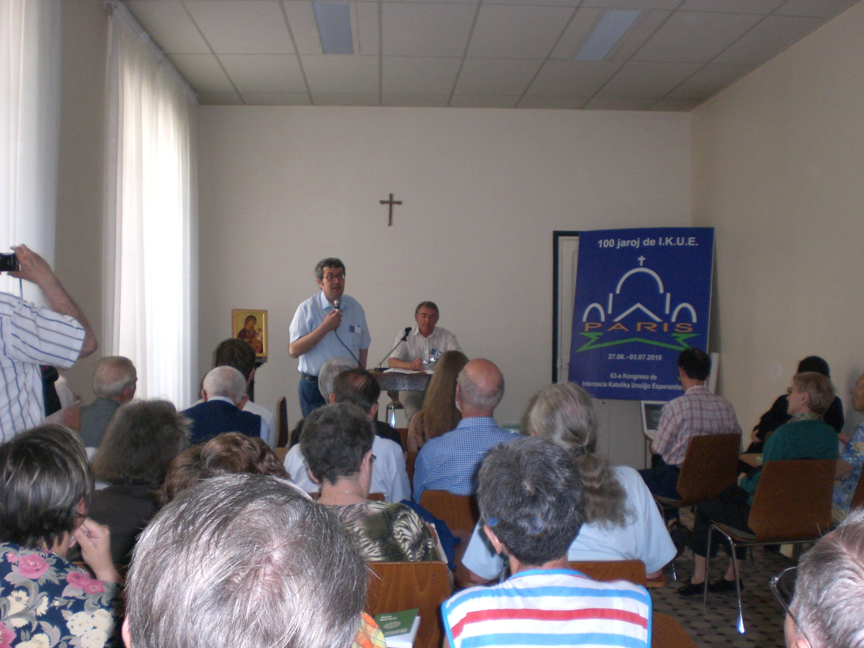 Malfermo de la IKUE-Kongreso 2010 en Parizo la 27-an de junio 2010 fare de C. Sarandrea kaj M. Šváček